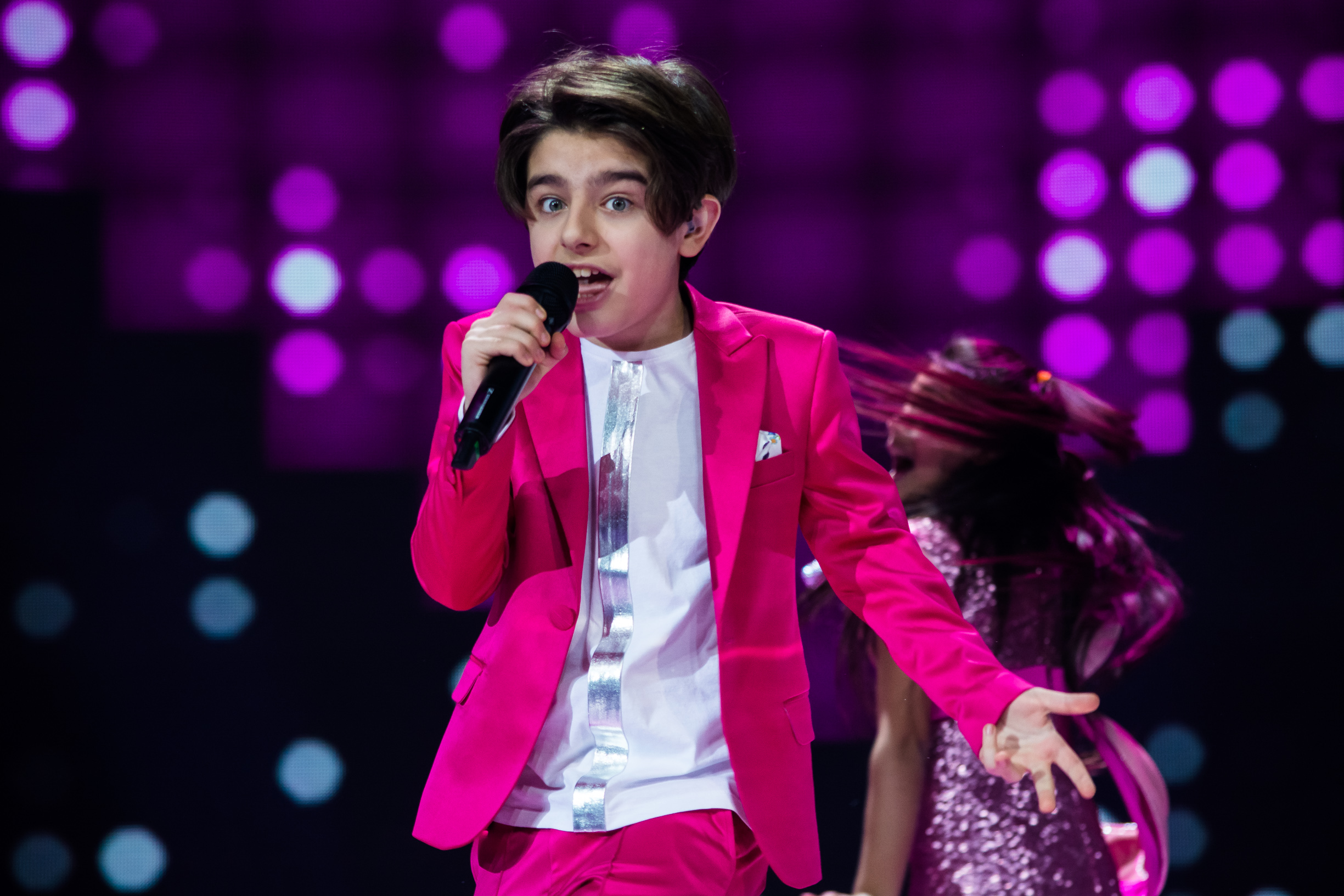 Мика на сцене Детского Евровидения 2015 («Армеец», София) во время генеральной репетиции